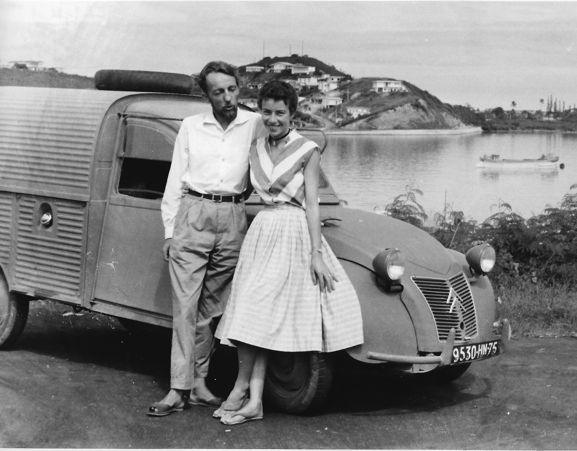 Les photographes Jean-Maurice et Françoise CART en Nouvelle Calédonie lors de leur Tour du Monde en 2CV entre 1959 et 1961. Auto-portrait.